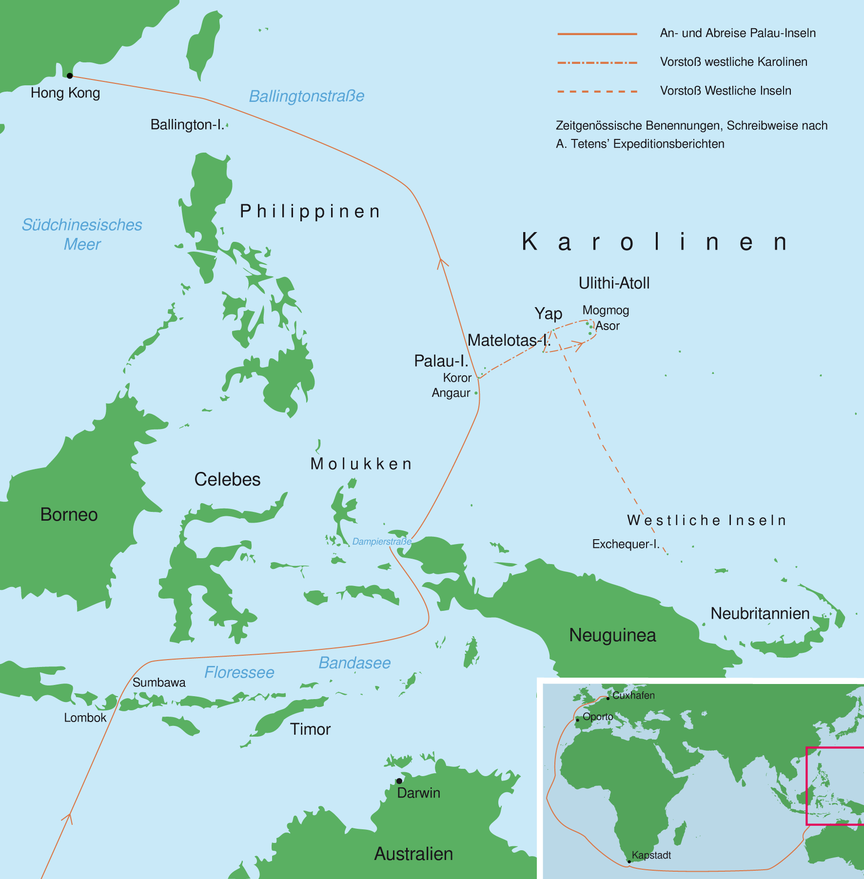 Karte zur ersten Vesta-Expedition Alfred Tetens’, Aug. 1865–Sept. 1866 (zeitgenössische Benennungen). Die Namen von Inselgruppen, Atollen, Inseln und Orten sind die im 19. Jahrhundert in Deutschland gebräuchlichen. Die Schreibweise orientiert sich an Tetens' Expeditionsberichten. PNG-Version zur Einbindung in Artikel.